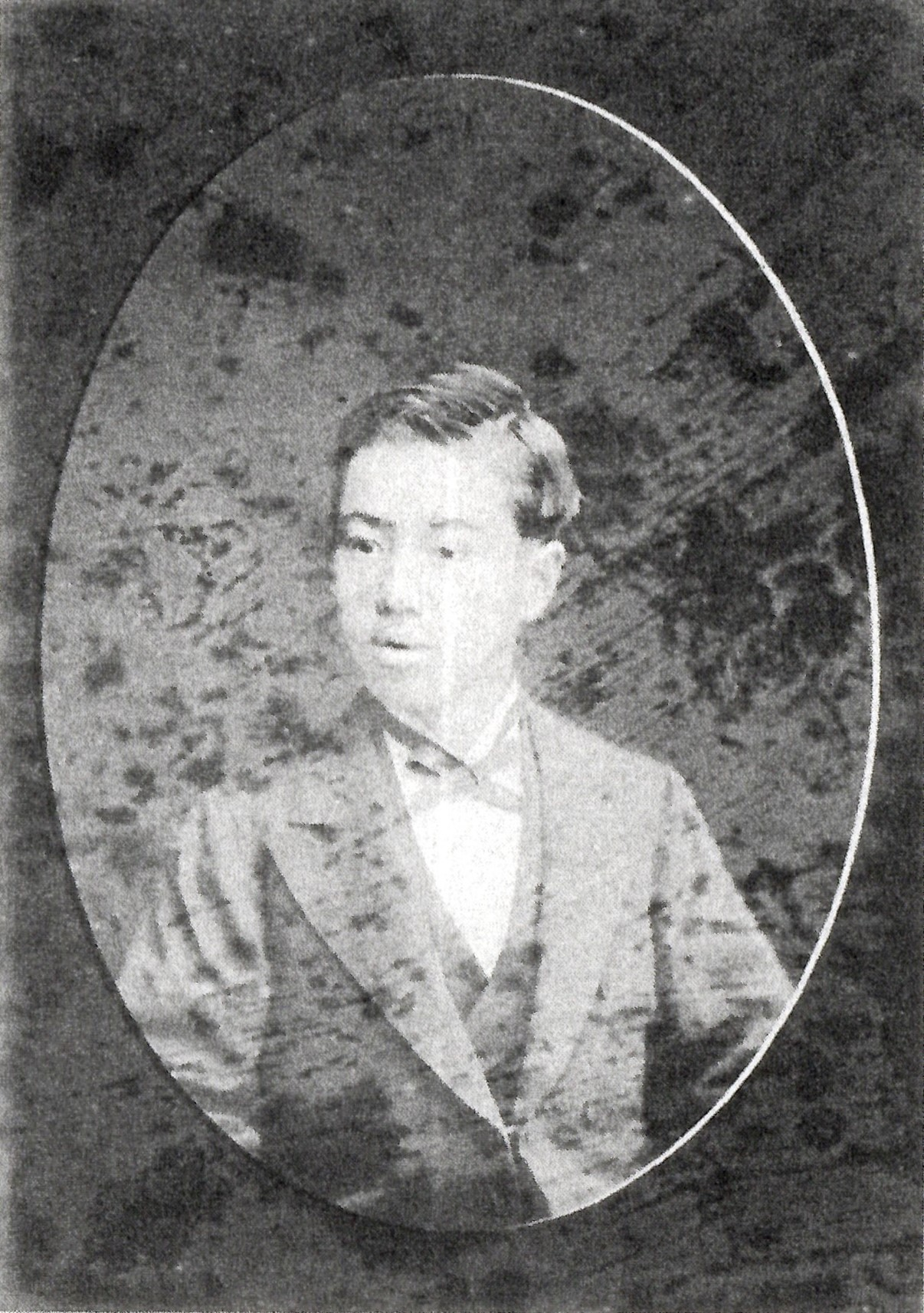 樋口誠康の肖像写真。